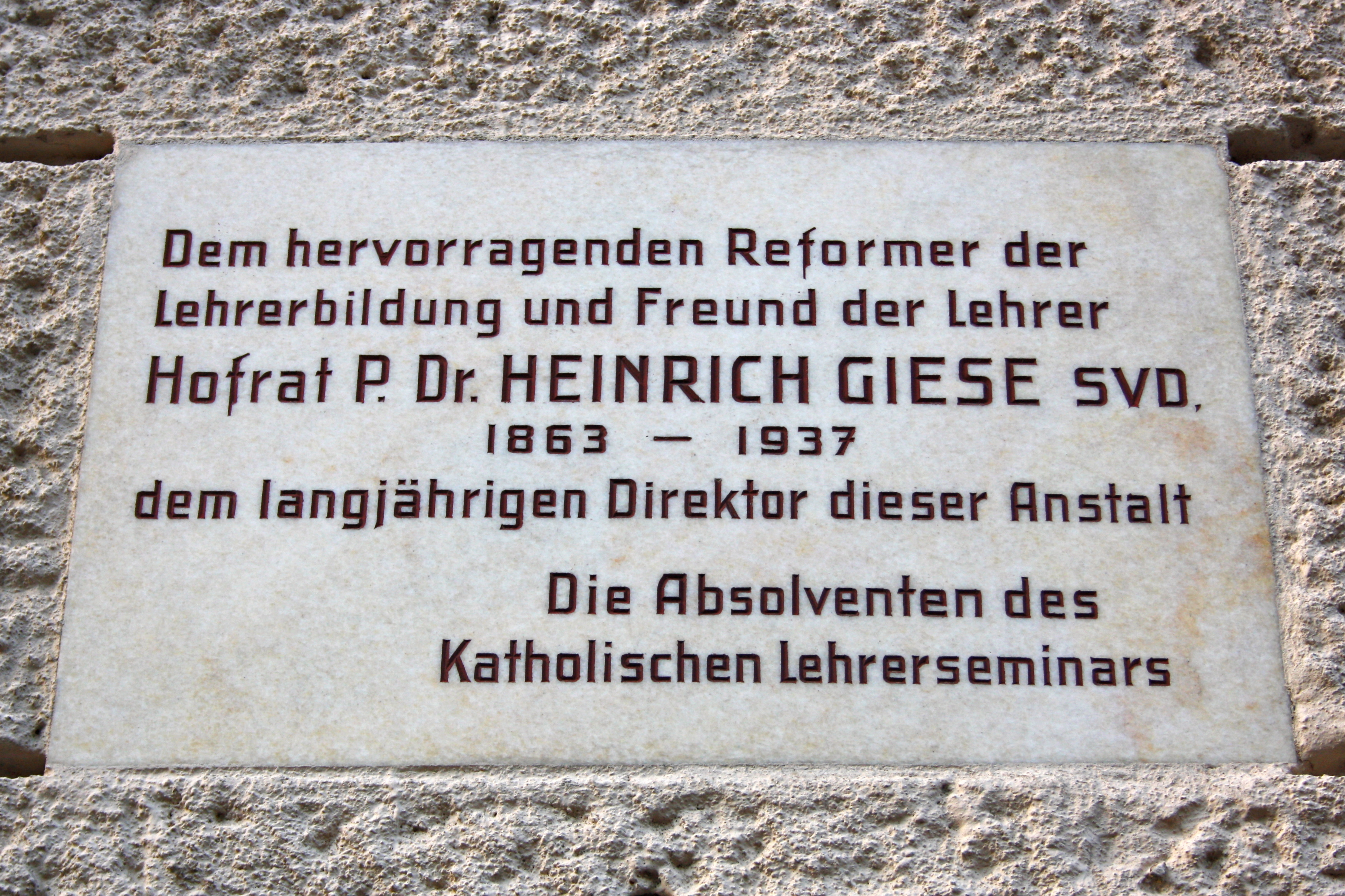 Gedenktafel für Heinrich Giese an der Lehrerbildungsanstalt der Marianisten, Michaelerstraße 10, 1180 Wien.